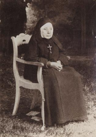 Zdjęcie Marii Angeli Truszkowskiej.